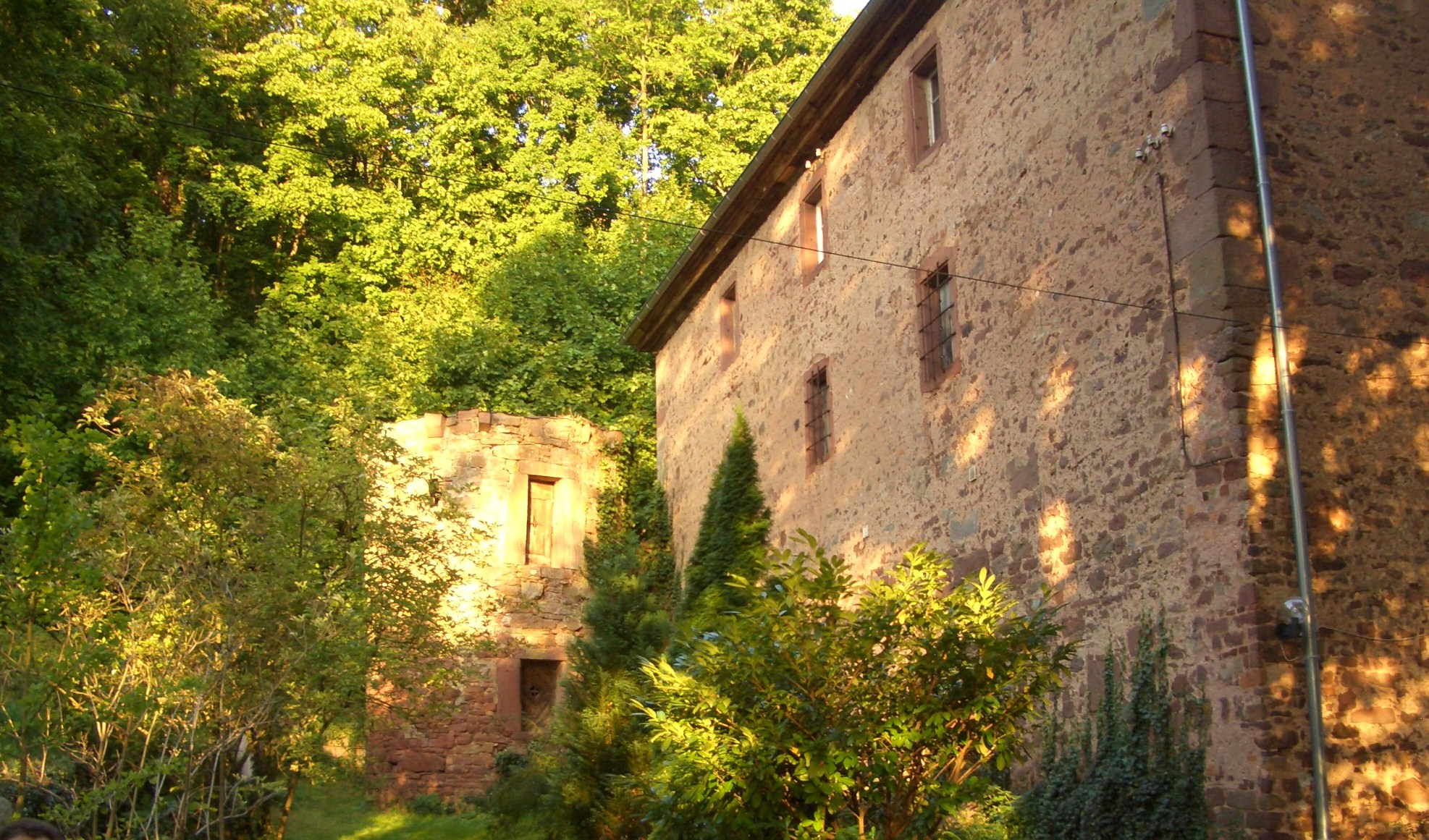 Gamburg, Unteres Schloss mit Wehrturm